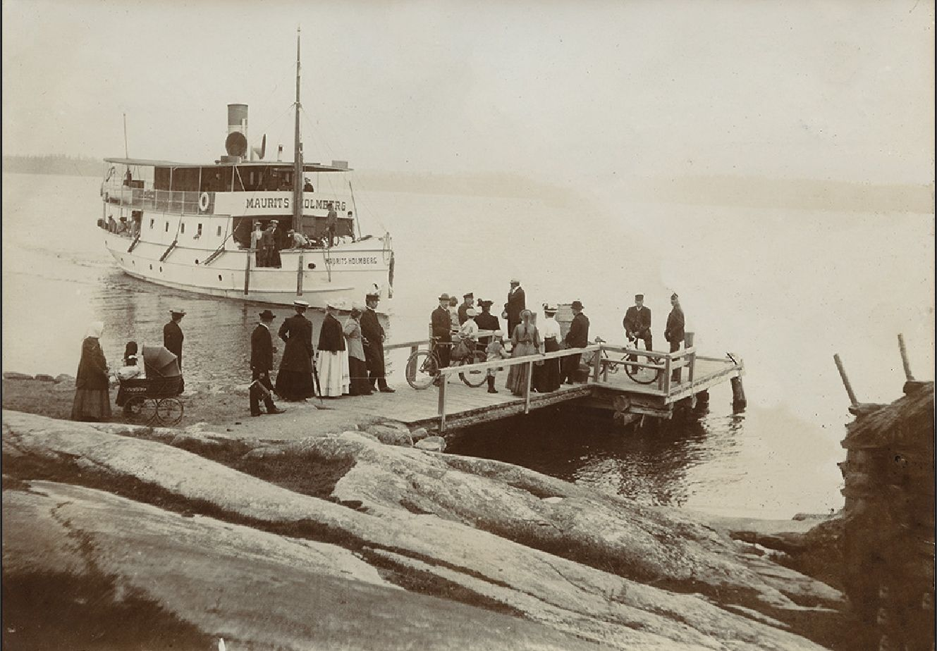 Höyrylaiva Maurits Holmberg tulossa laituriin Karunan Oressaaressa vuonna 1909